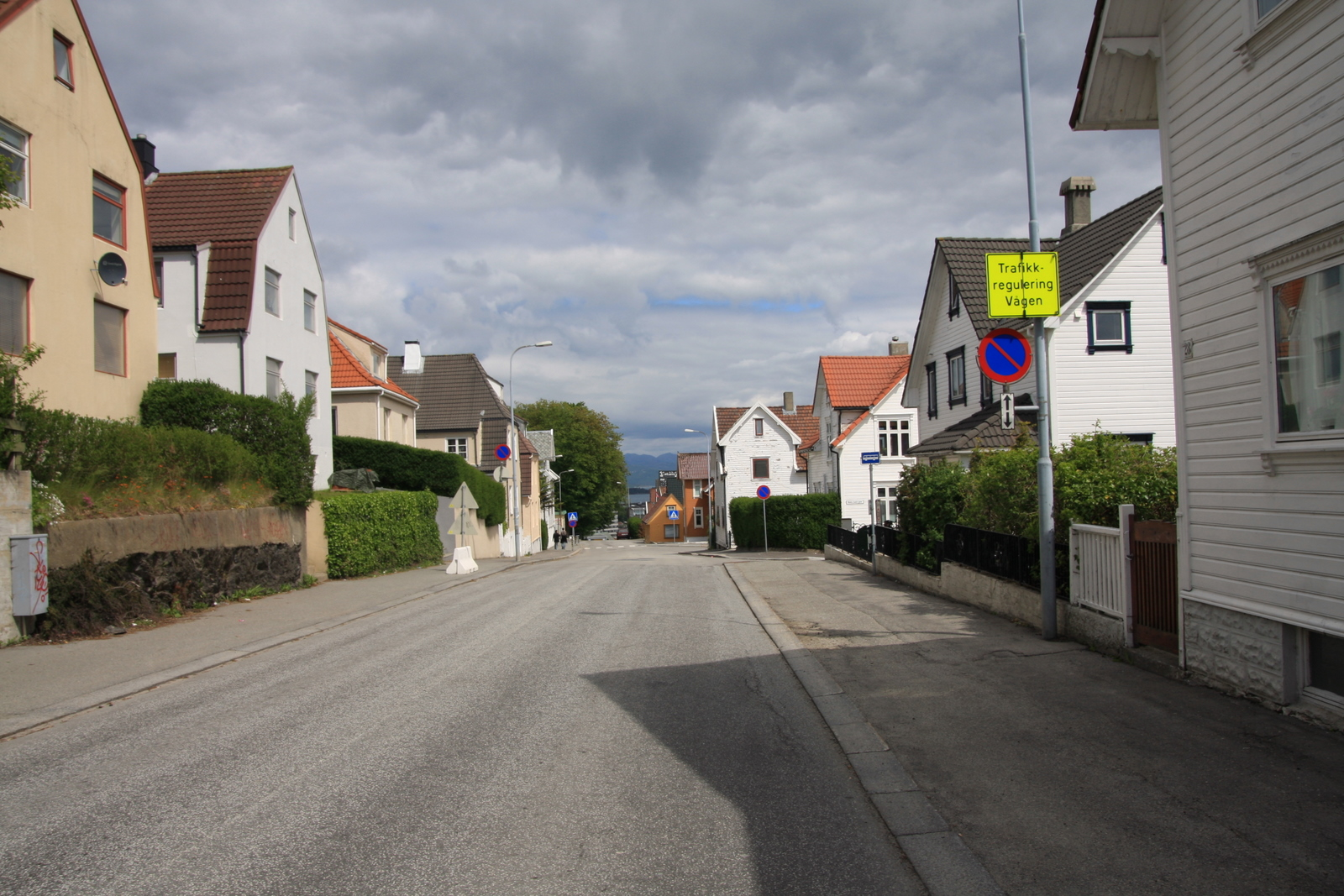 Fylkesvei 415 (Stokkaveien)